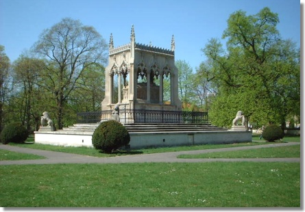 Mauzoleum of Potocki in Poland